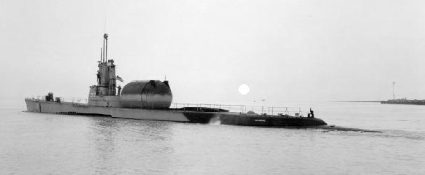 USS Barbero